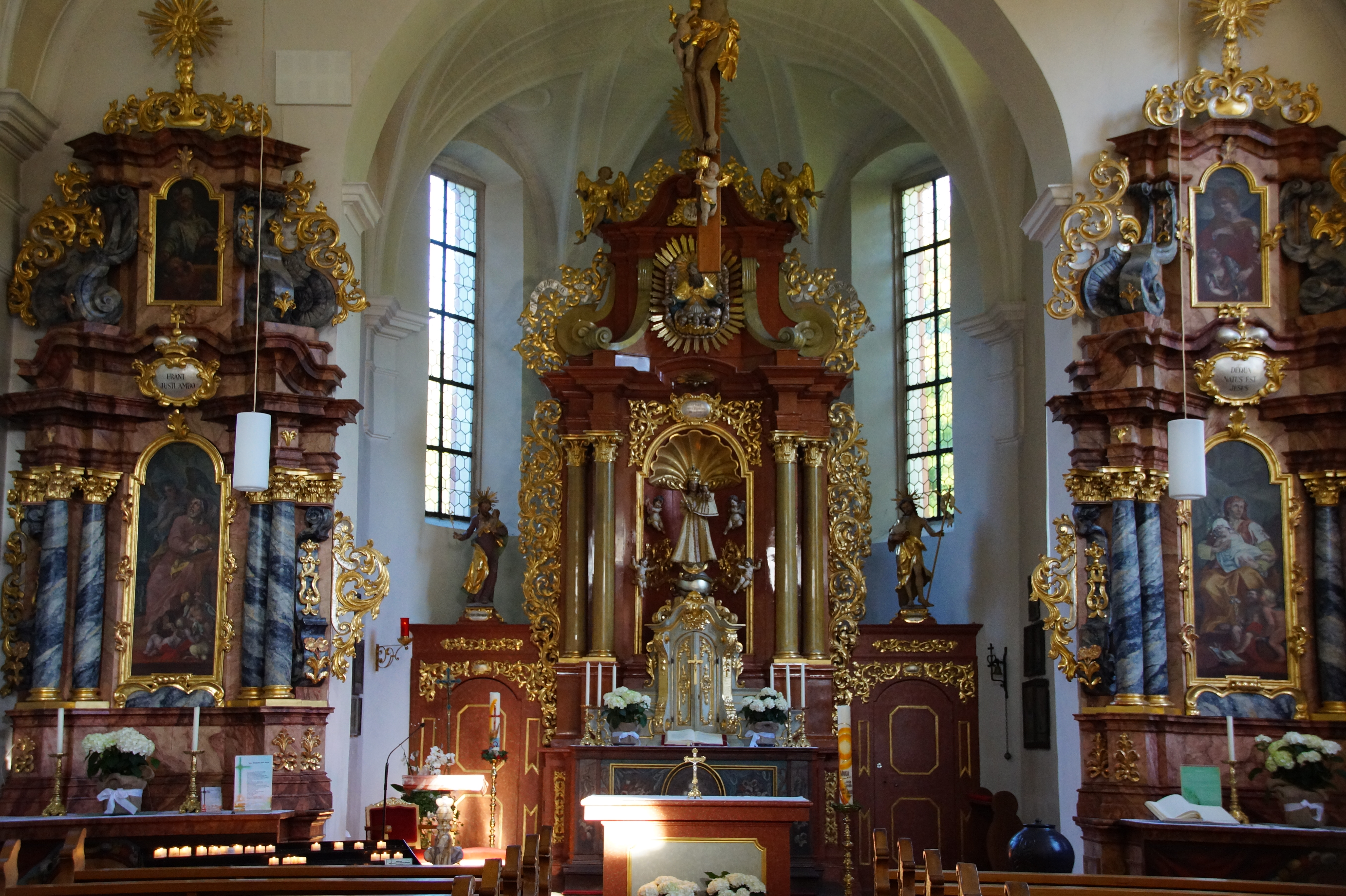 Hochaltar (vermutlich von Johann AntonSchupp) in der Wallfahrtskapelle Schenkenberg bei Emmingen-Liptingen in Baden-Württemberg, Schenkenberg 20